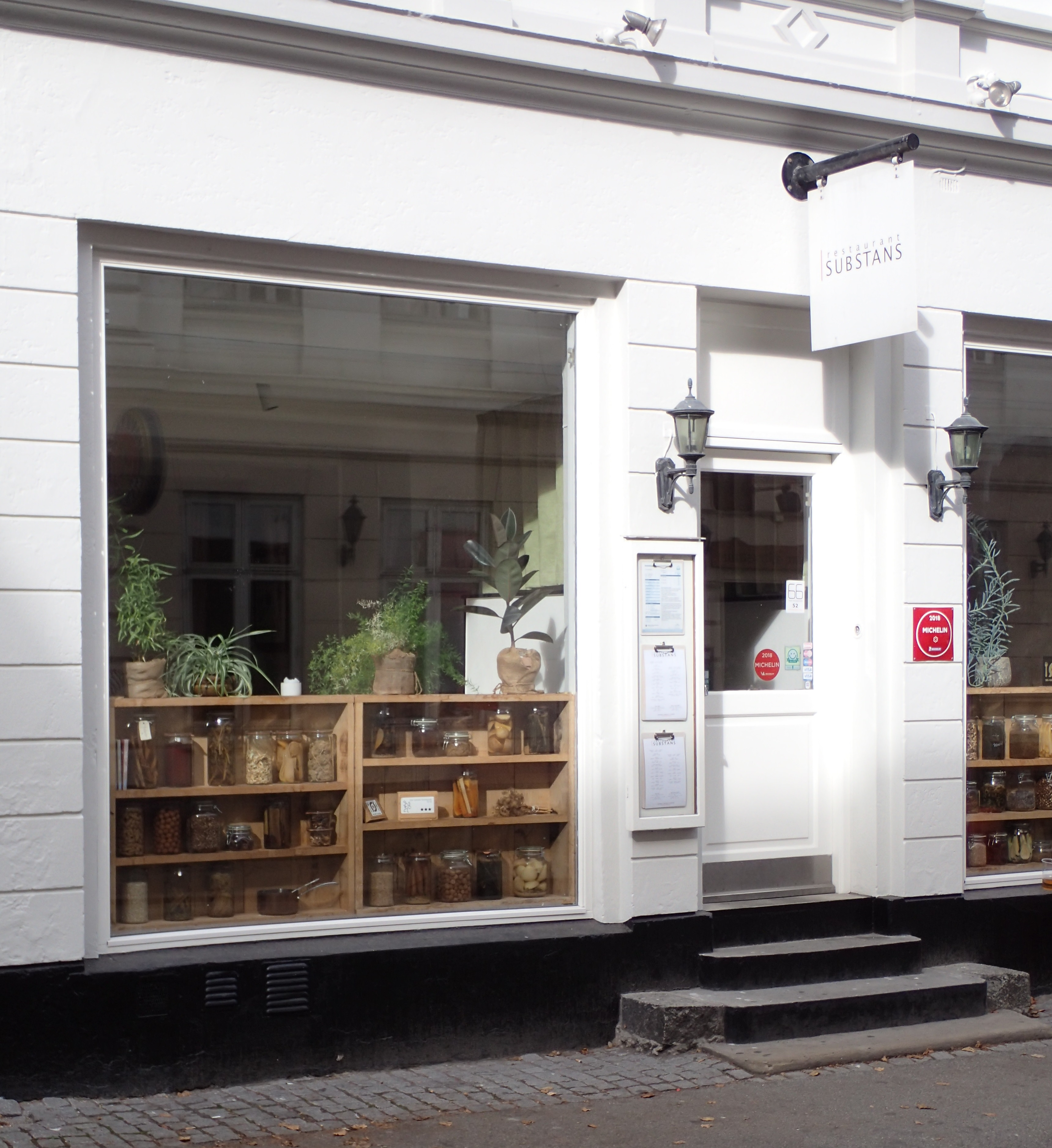 Restaurant Substans.